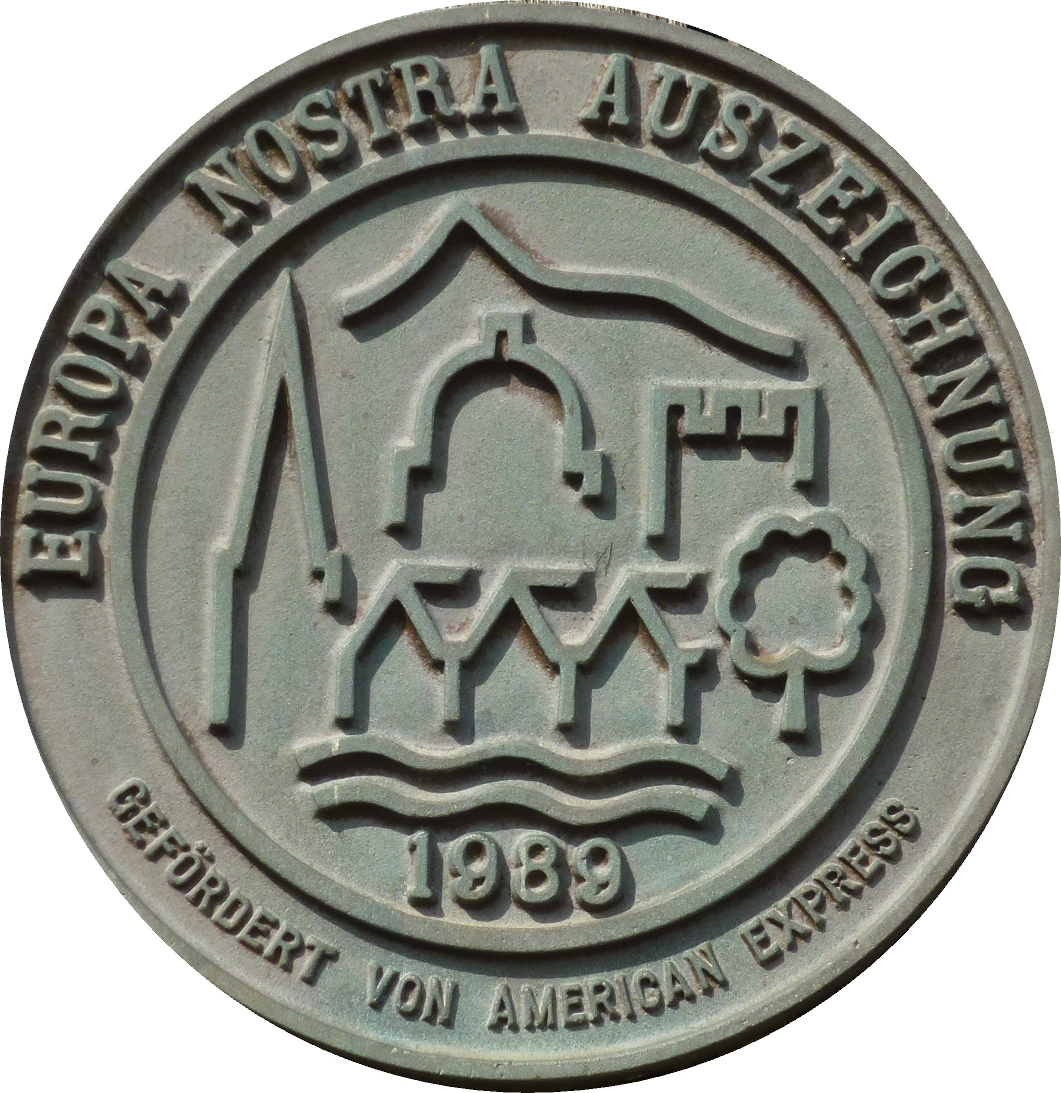 Eiderkanalschleuse bei Krummwisch